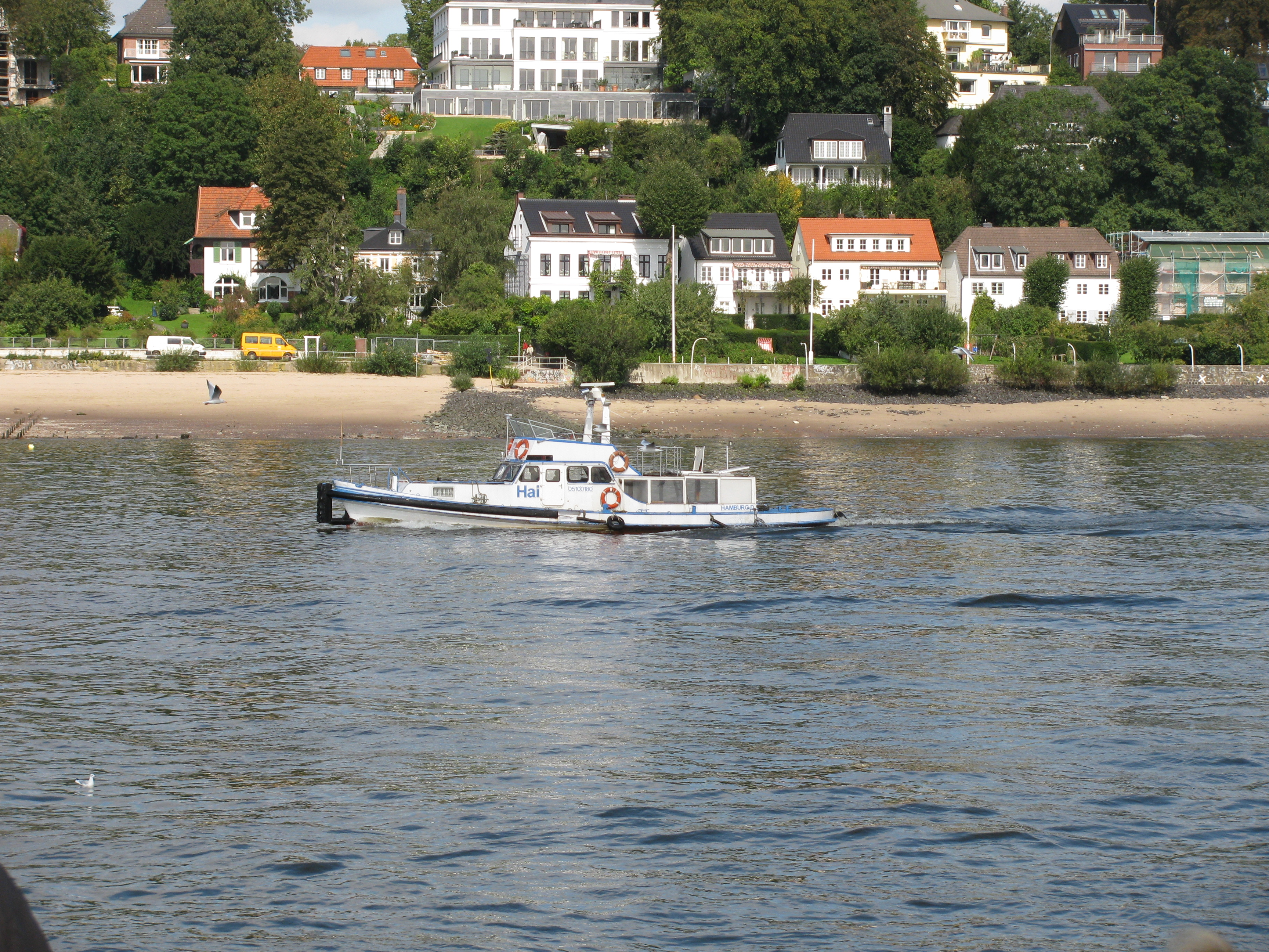 das Schiff Hai auf der Norderelbe in Hamburg